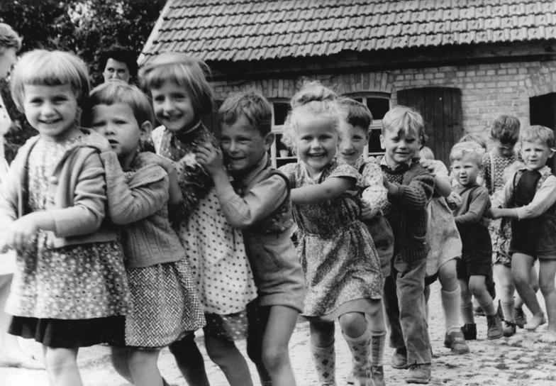 Henningsleben, Kindergartenkinder im Spiel Zentralbild Weigelt 13.10.1961 Erntekindergärten in Henningsleben Gut aufgehoben sind die Kleinsten von Henningsleben bei Bad Langensalzen im Kindergarten (unser Bild), während ihre Eltern auf den Feldern der Genossenschaft die reiche Kartoffelernte einbringen.